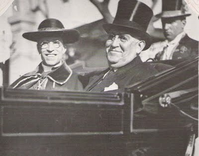 Eugenio pacelli en Argentina con el presidente Justo.